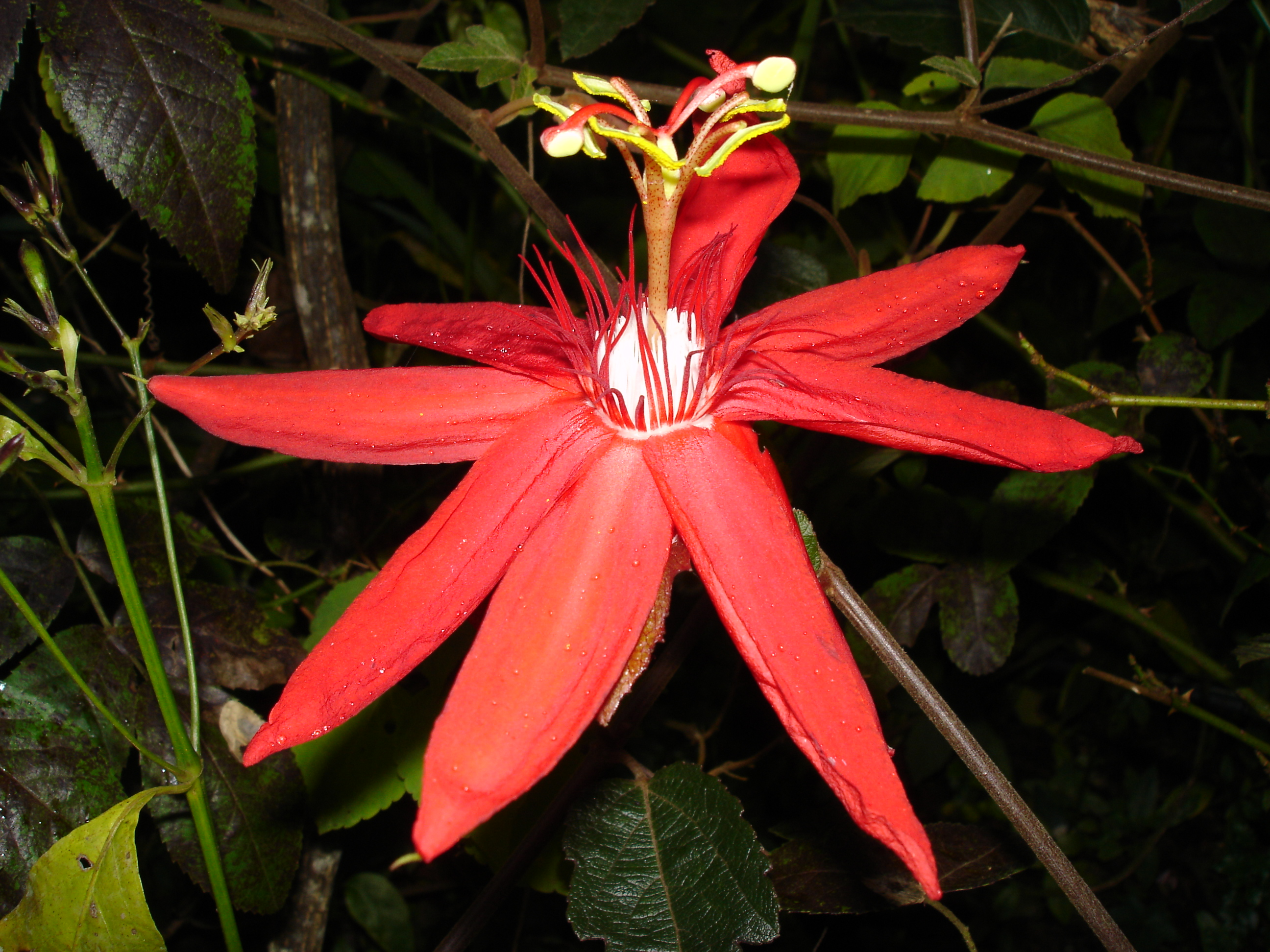 Description: Passiflora vitifolia dans la cour de la villa Folio, novembre 2004, La Réunion Source: Bouba